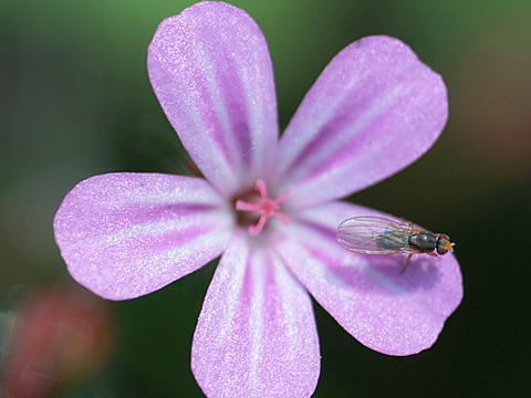 Taufliege